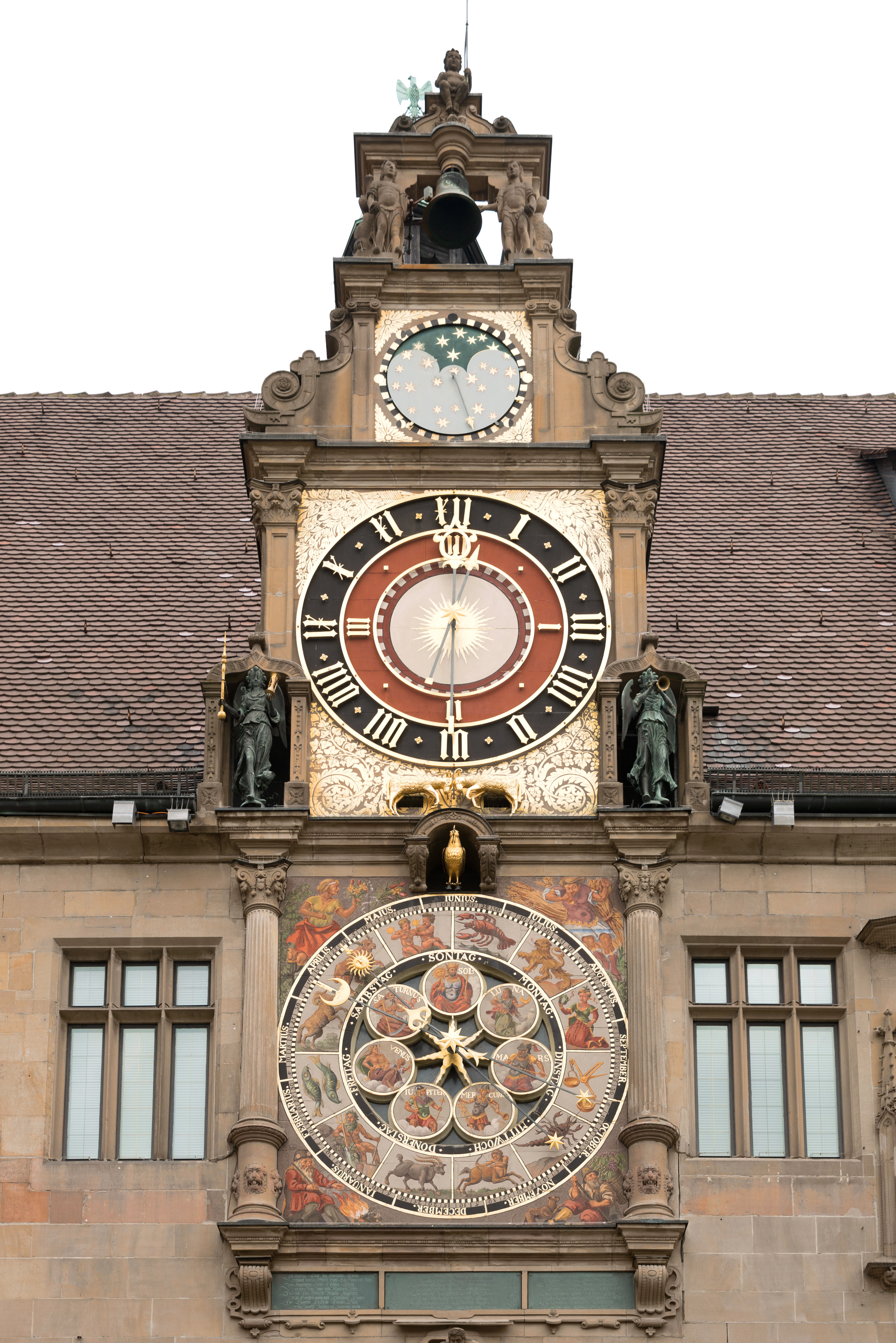 Altes Rathaus Heilbronn. Kunstuhr und Giebel.